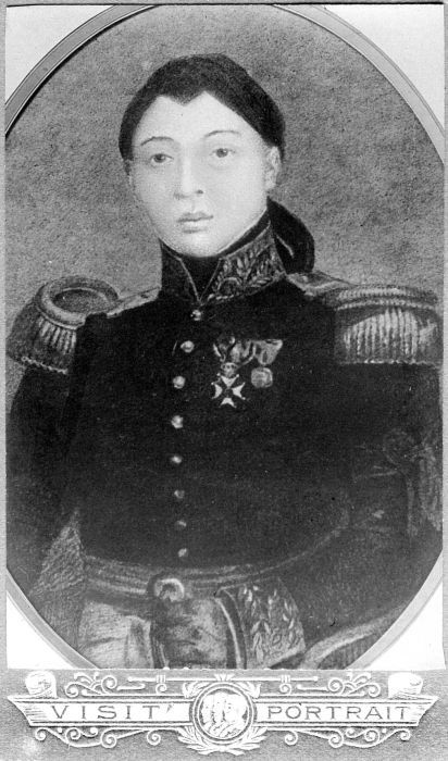 Repronegatif. KGPAA Mangkunegara III, memerintah Mangkunegaran dari 1835 hingga 1853